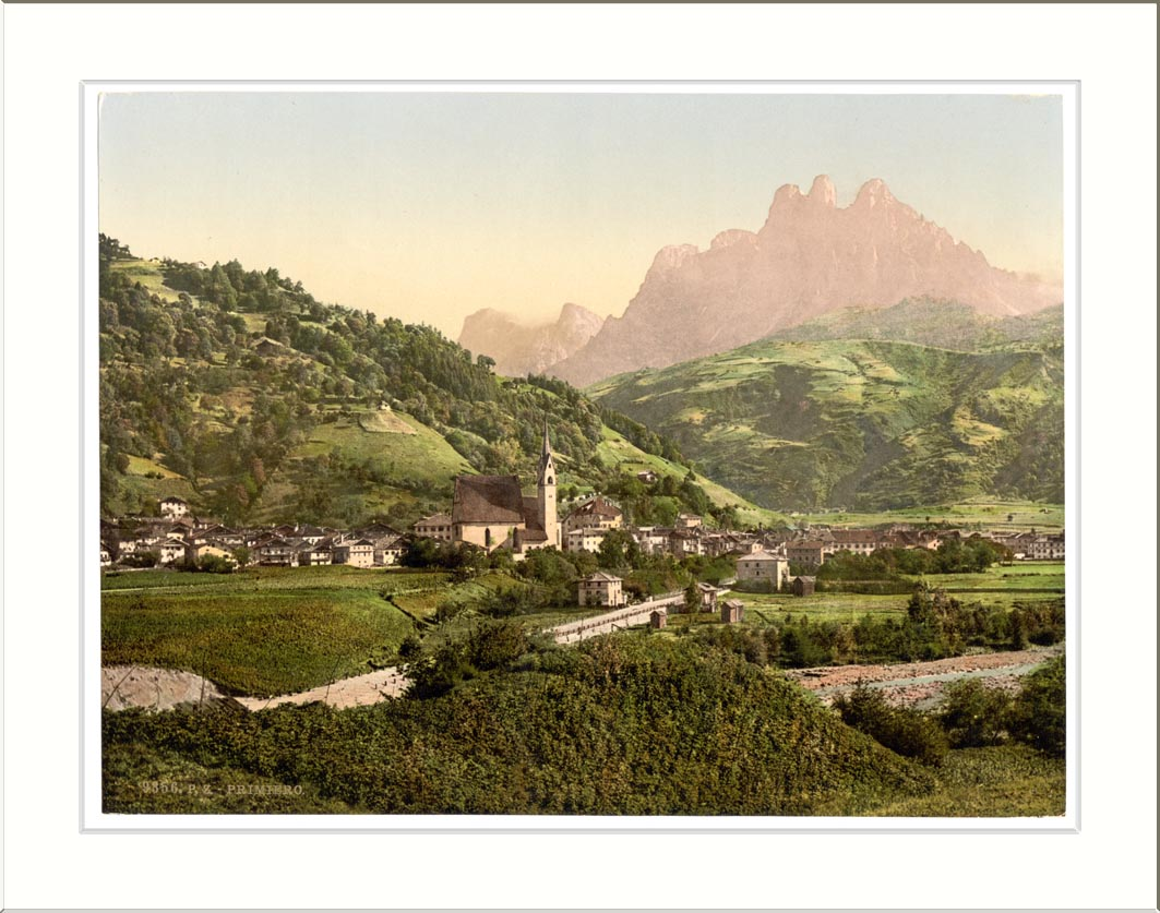 Primiero Tyrol Austro-Hungary